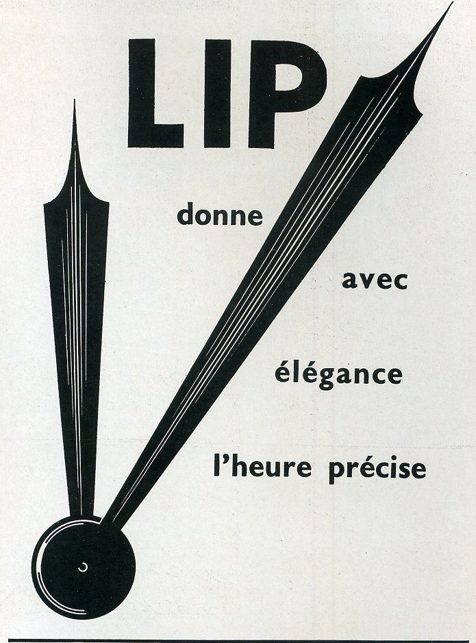 Horloges